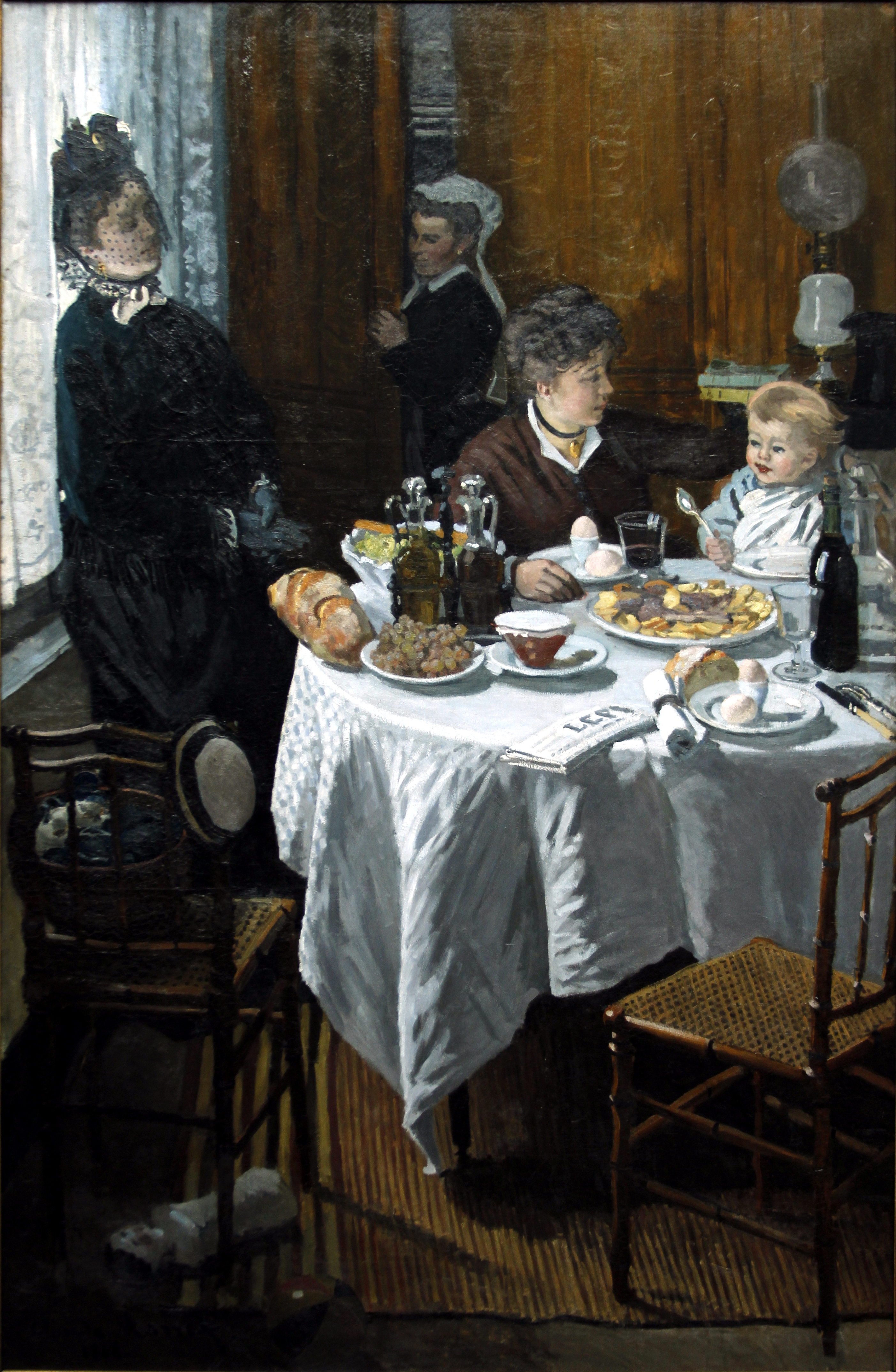 Städel - Frankfurt am Main - Germany